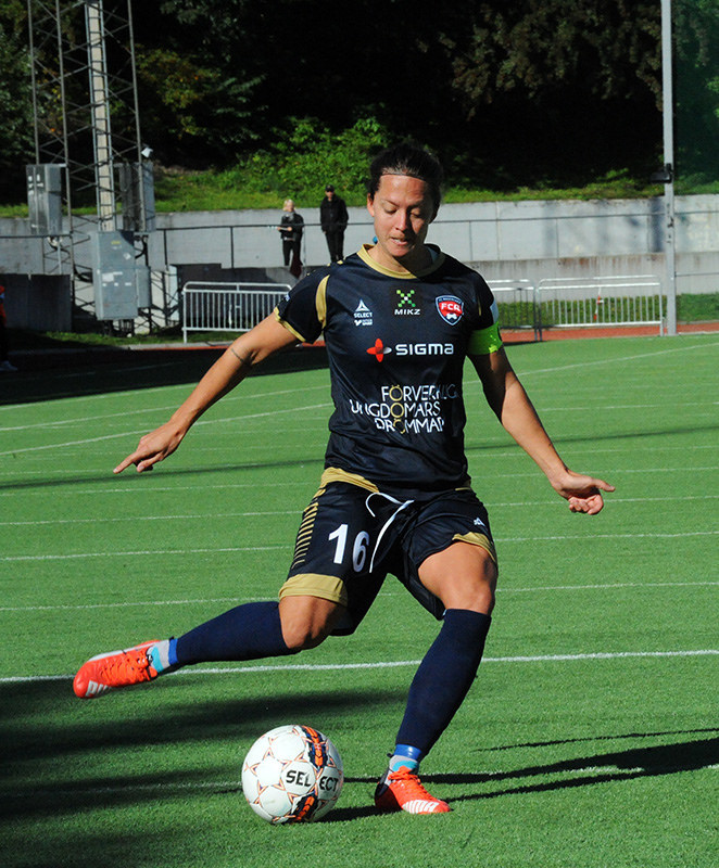 a_14_4798